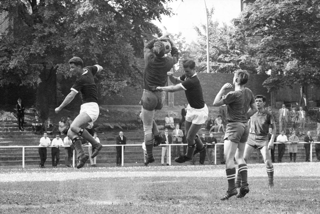 im Stadion Waldwiese an der Hamburger Chaussee.